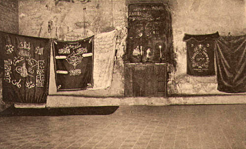 Historical images of Haifa תמונות היסטוריות של חיפה מערת אליהו בחיפה , 1910